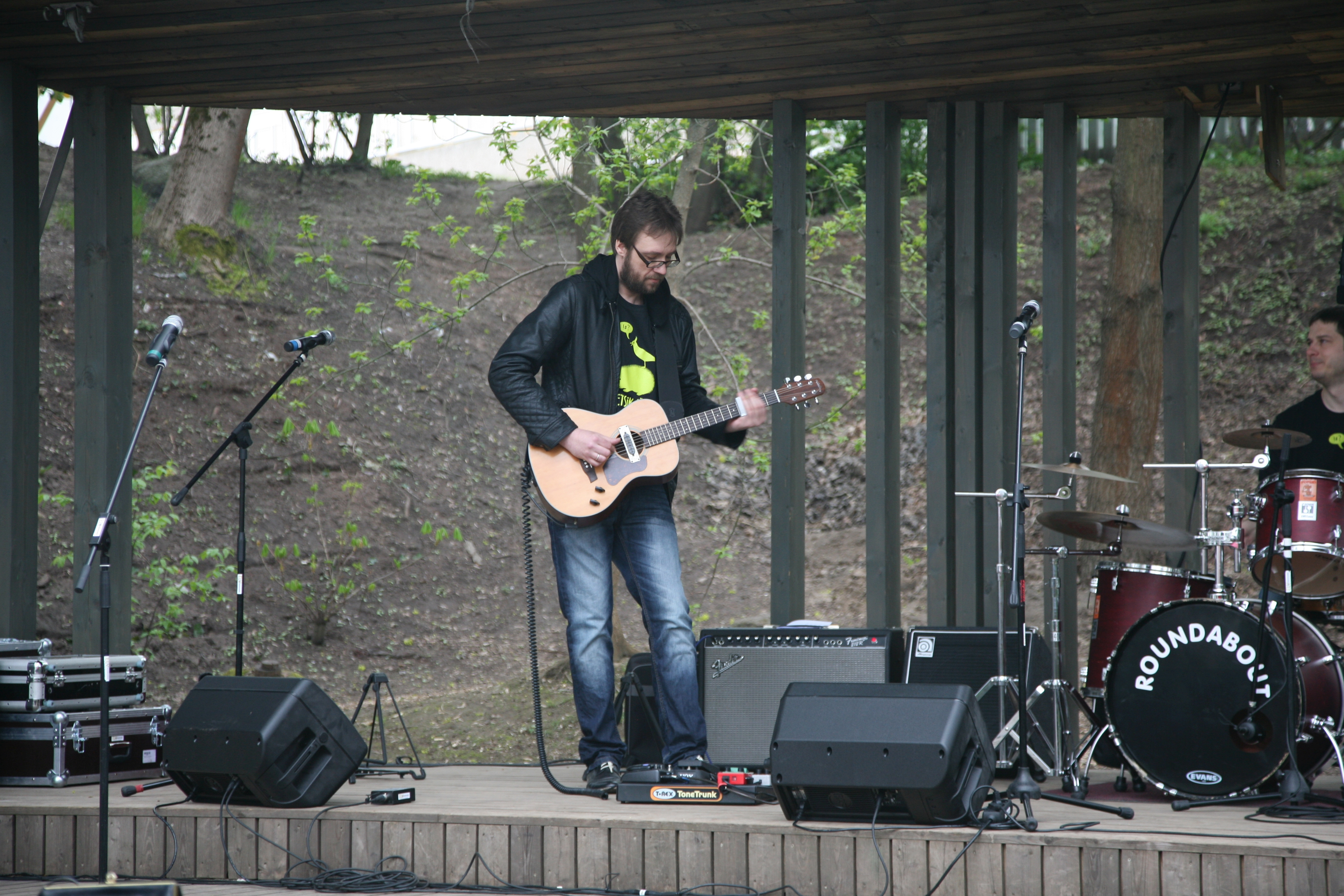 Andres Roots Prima Vista 2015 avamisel